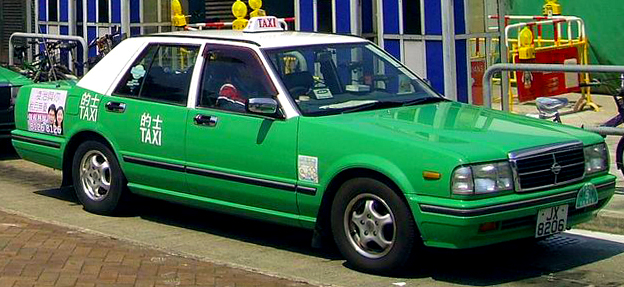 中文（香港）: 大埔墟站外停泊的新界的士